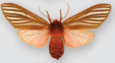 Pseudohemihyalea sonorosa female